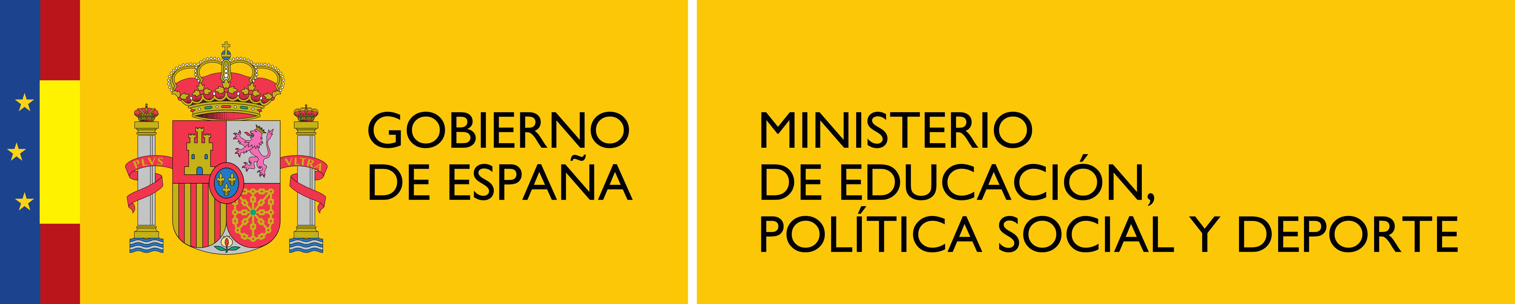 Logotipo del Ministerio de Educación, Política Social y Deporte